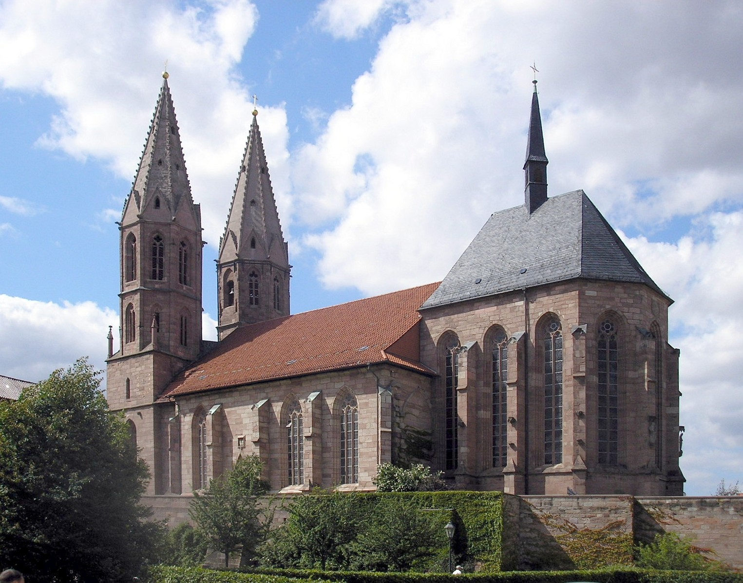 Die Kirche St. Marien in Heiligenstadt (Thüringen).